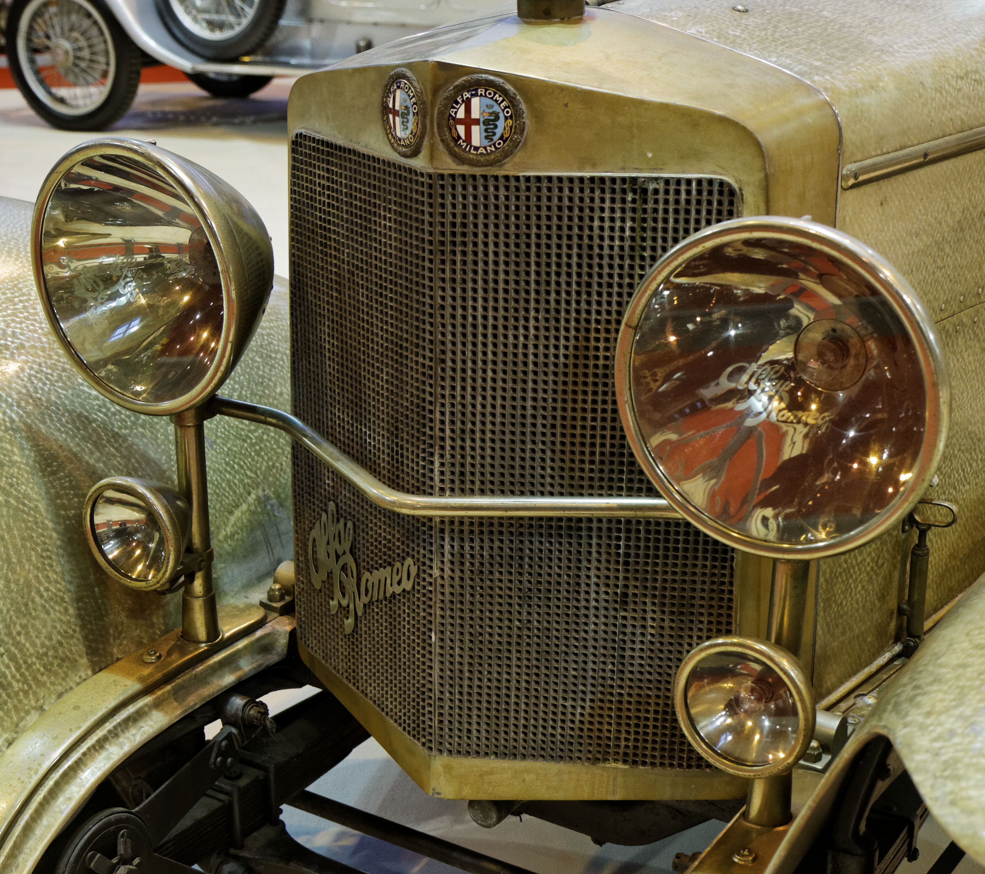 L'Alfa Romeo RL SS exposée lors du salon Retromobile 2014